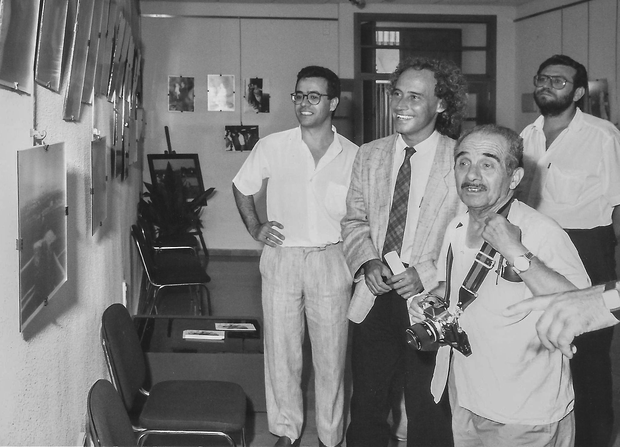 Aquesta exposició es va inaugurar el 14 d'agost de 1986 a la Sala Municipal d'exposicions d'Alginet. Data de la fotografia: 20-08-86.